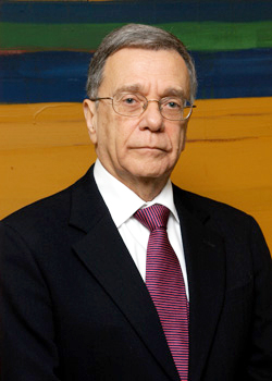 Professor Jorge Alberto Costa e Silva